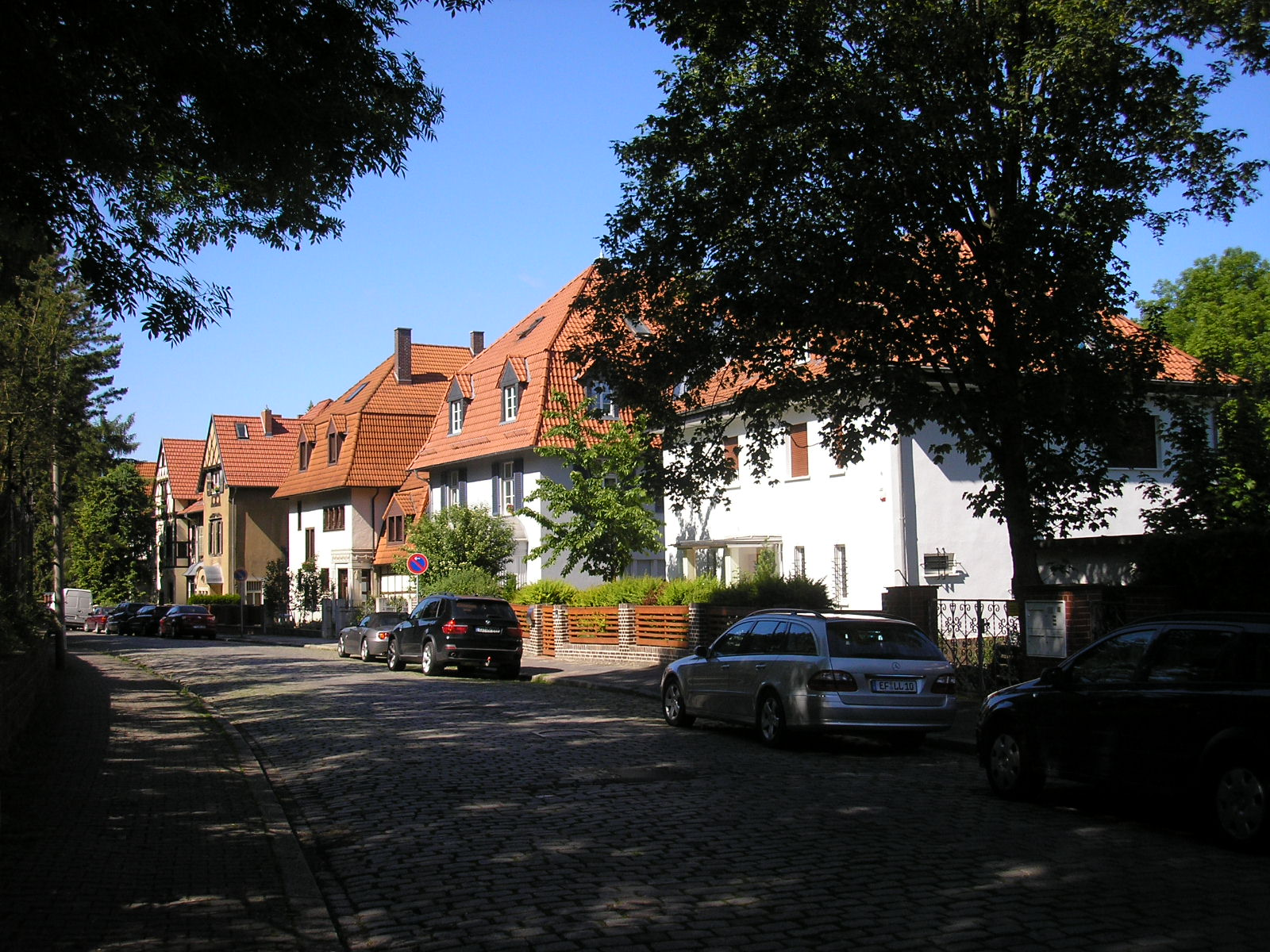 Blick durch die Cyriakstraße in Erfurt.